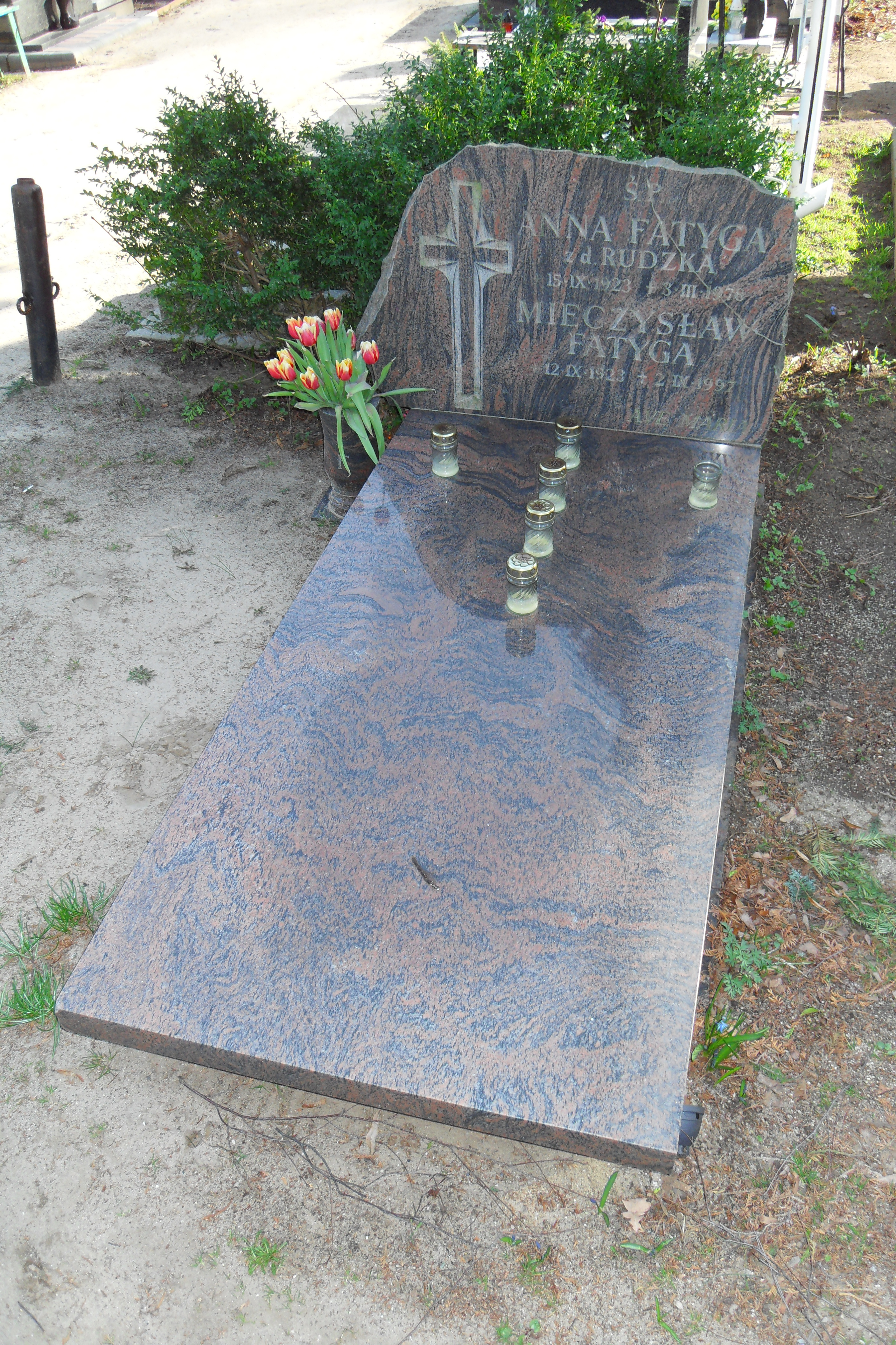 Gdańsk Oliwa. Cmentarz Oliwski, grób Mieczysława Fatygi (1923-1997).